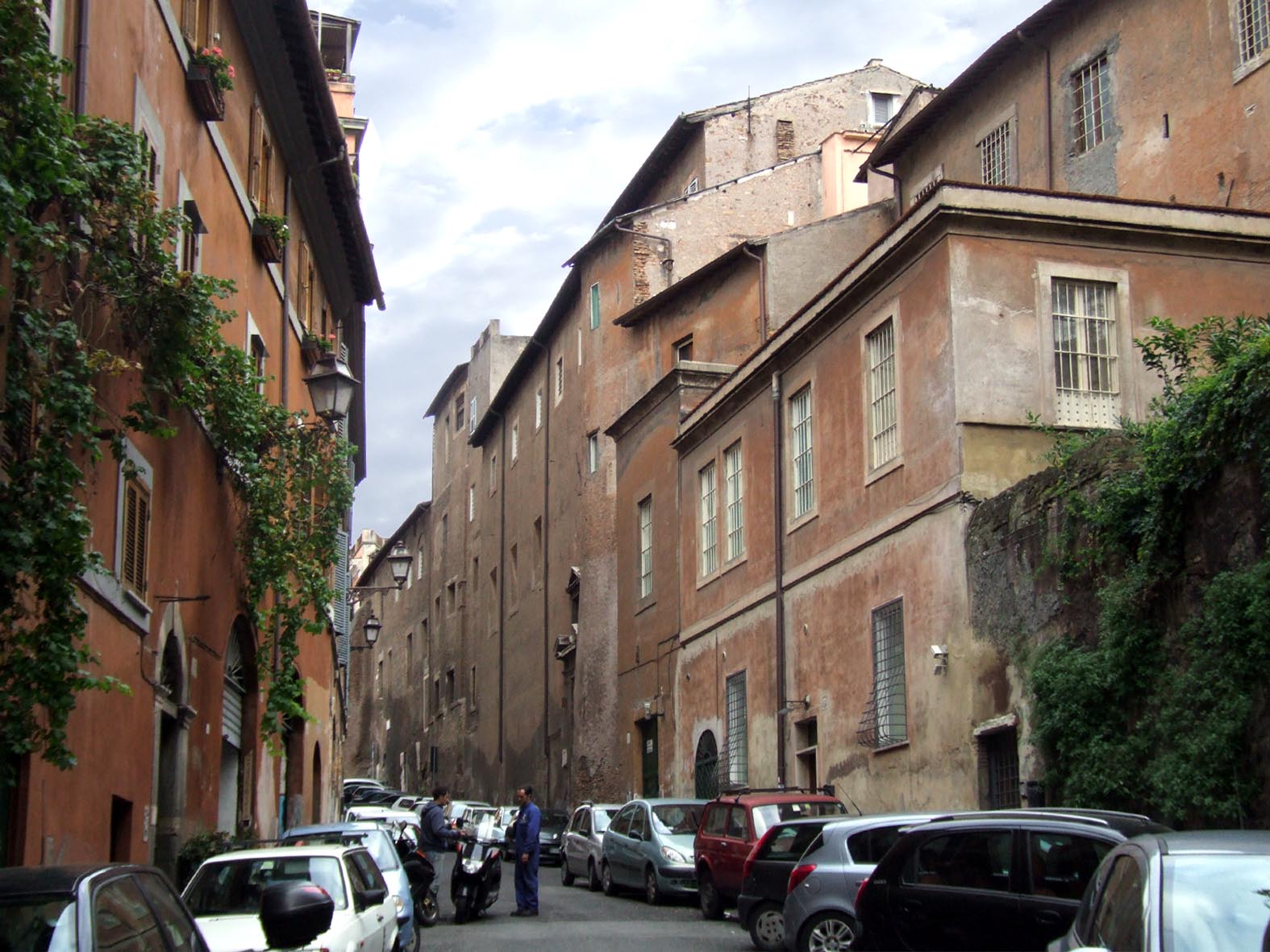 Santa Lucia dei Selci, Roma, Facciata